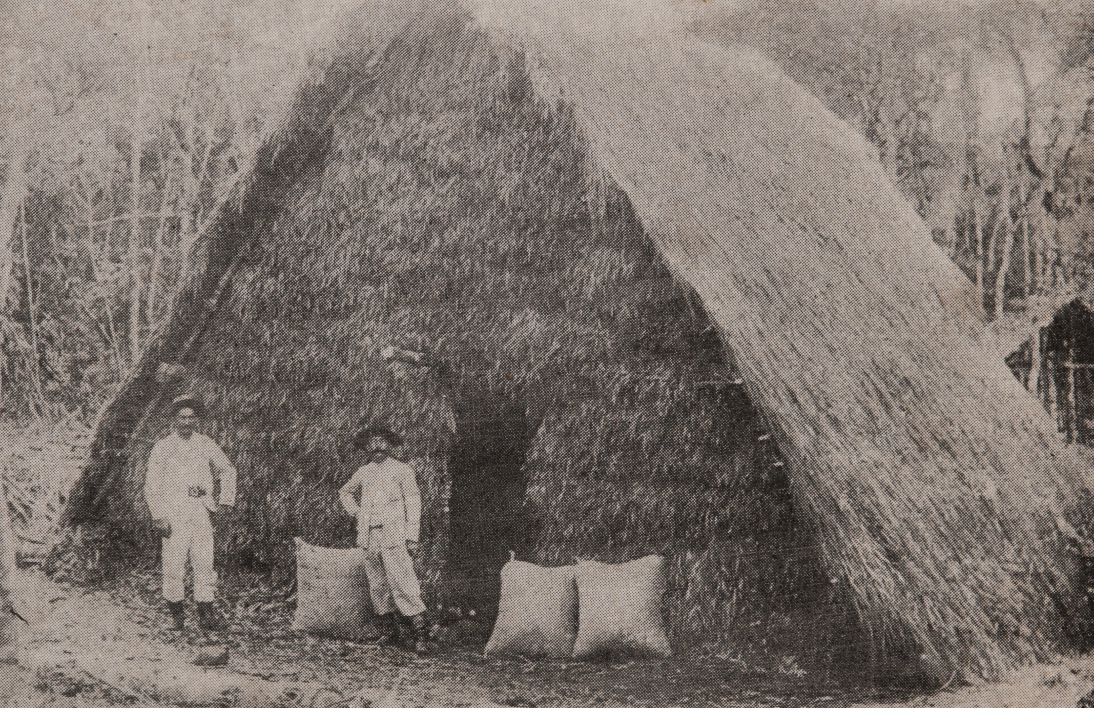 Obra que integra o acervo do Museu Paulista da USP. Coleção João Baptista de Campos Aguirra.